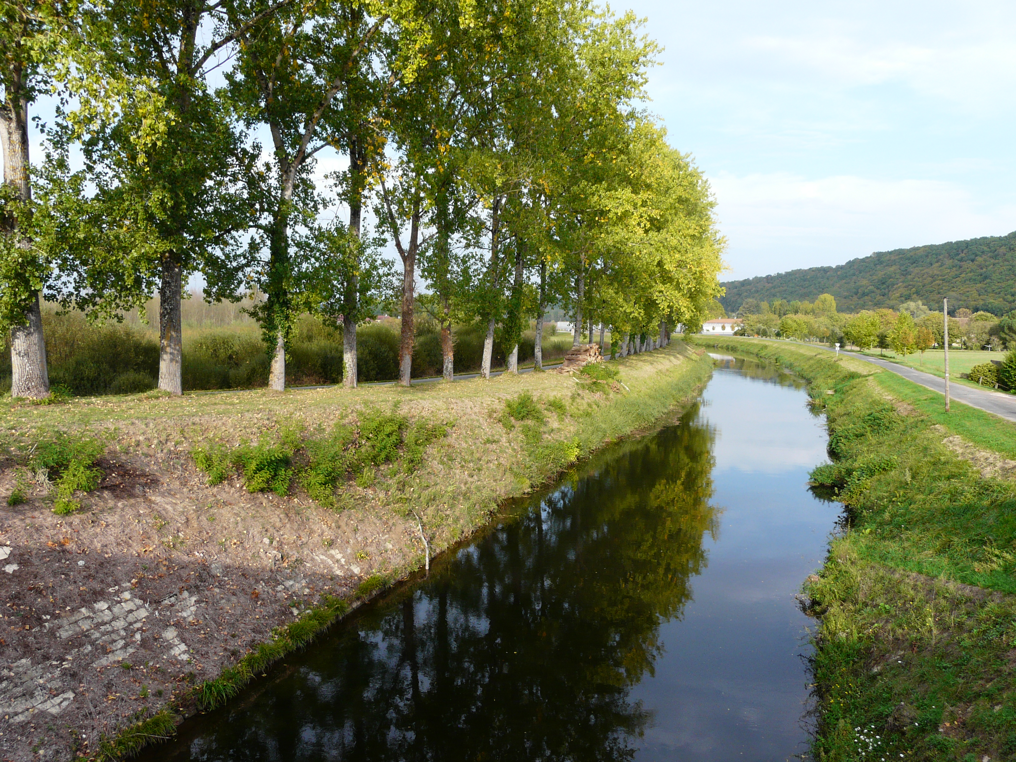 Le canal de Lalinde en amont du pont du Port de Badefols, Lalinde, Dordogne, France.